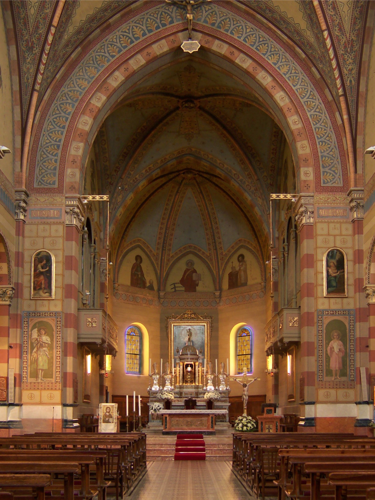 Arzago d'Adda BG (Italy) - Chiesa Parrocchiale di San Lorenzo